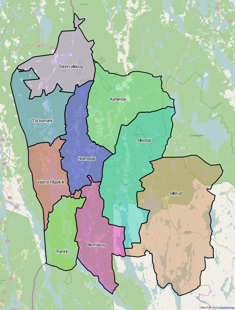 Distriktsindelningen i Årjängs kommun World file 130.42395393869759346 0 0 -130.42395393869759346 1296951.43015584861859679 8345153.65403272025287151